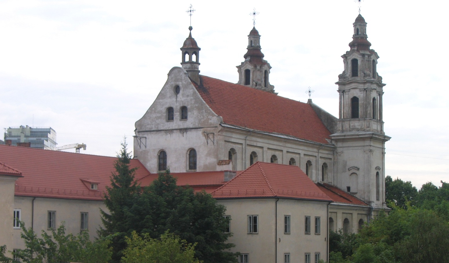 Autoriaus nuotrauka. 2006.07.29. Vilniaus Šv. arkangelo Rapolo bažnyčia